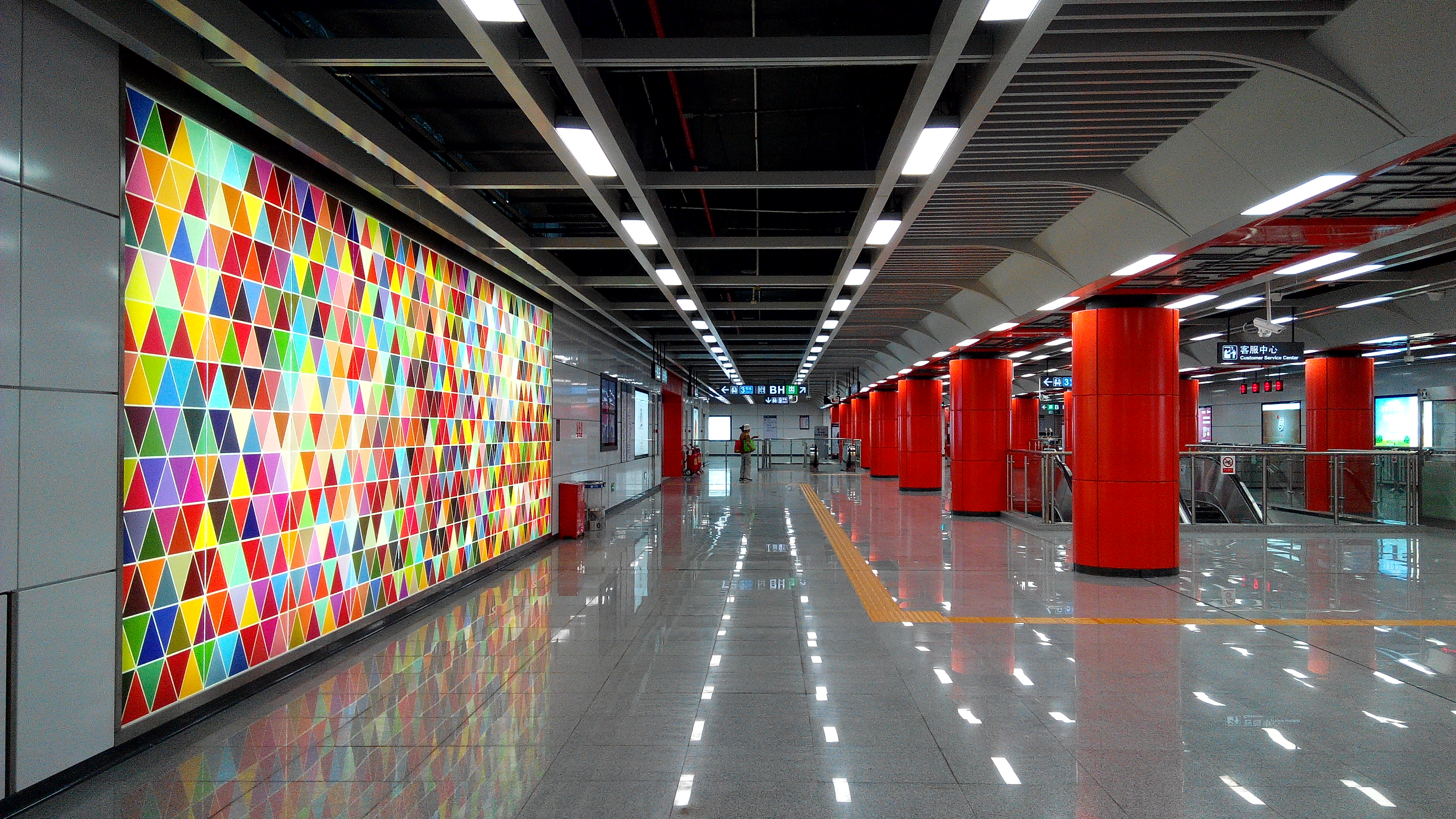 深圳地铁9号线 红岭站大堂